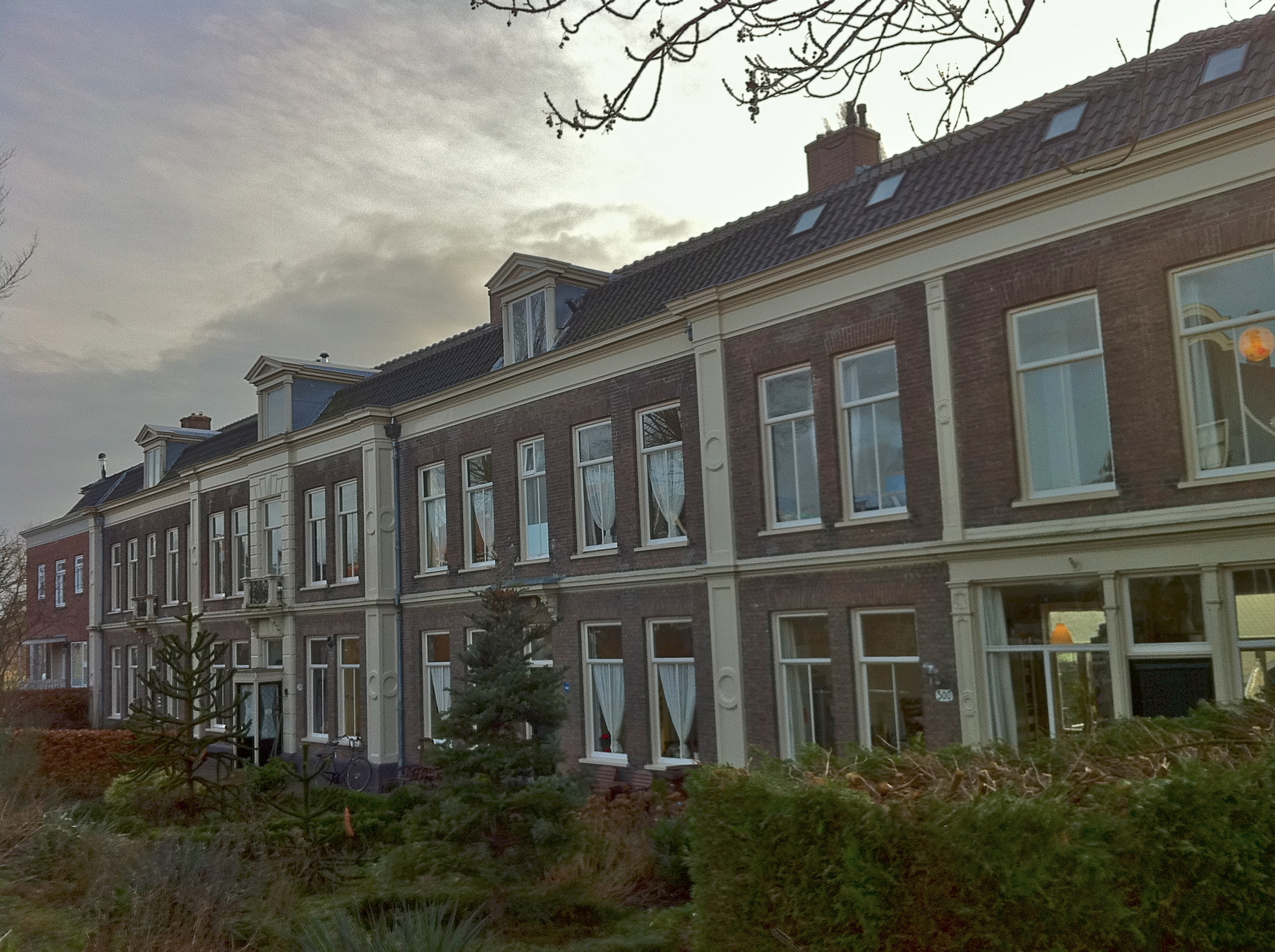 Nieuwendammerdijk 300-308, Amsterdam-Noord. Neoclassicistische huizen voor de gefortuneerde patiëntenkring van de wereldberoemde fysiotherapeut en later kuurarts Johan Georg Metzger (1838-1909). Hij kreeg de grond waarop ze gebouwd zijn van een Zweedse prinses voor zijn reuma-, ischias- en jichtpatiënten. Onder hen waren beroemdheden zoals keizerin Elisabeth (Sissi), Baron de Rothschild, keizerin Eugénie (echtgenote van Napoleon) en hoogleraar letterkunde J.A. Alberdink Thijm. Hierop liet hij rond 1875 de neoclassicistische herenhuizen Nieuwendammerdijk 300-308 bouwen.